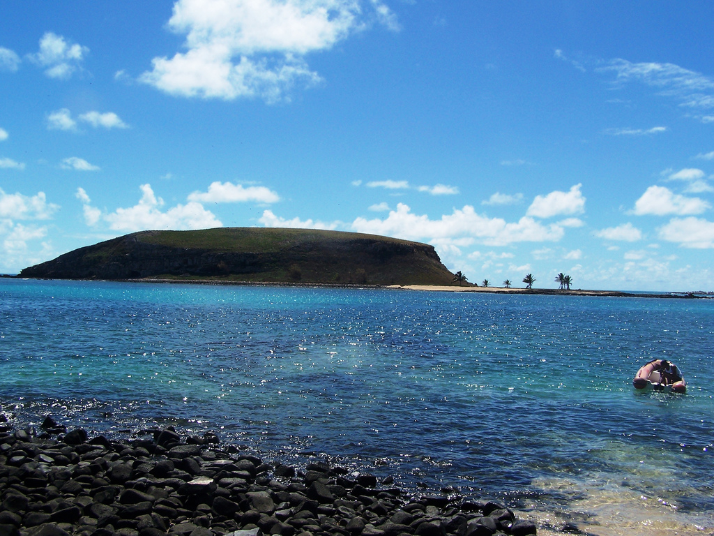 Ilha Redonda, Abrolhos, Porto Seguro, Bahia, Brasil.